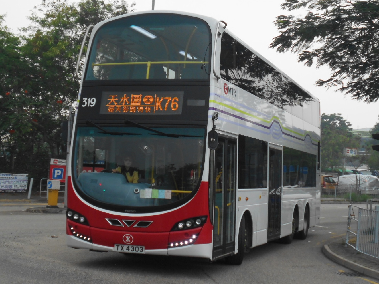 中文（香港）: 港鐵巴士K76線，正前往天水圍天恆邨